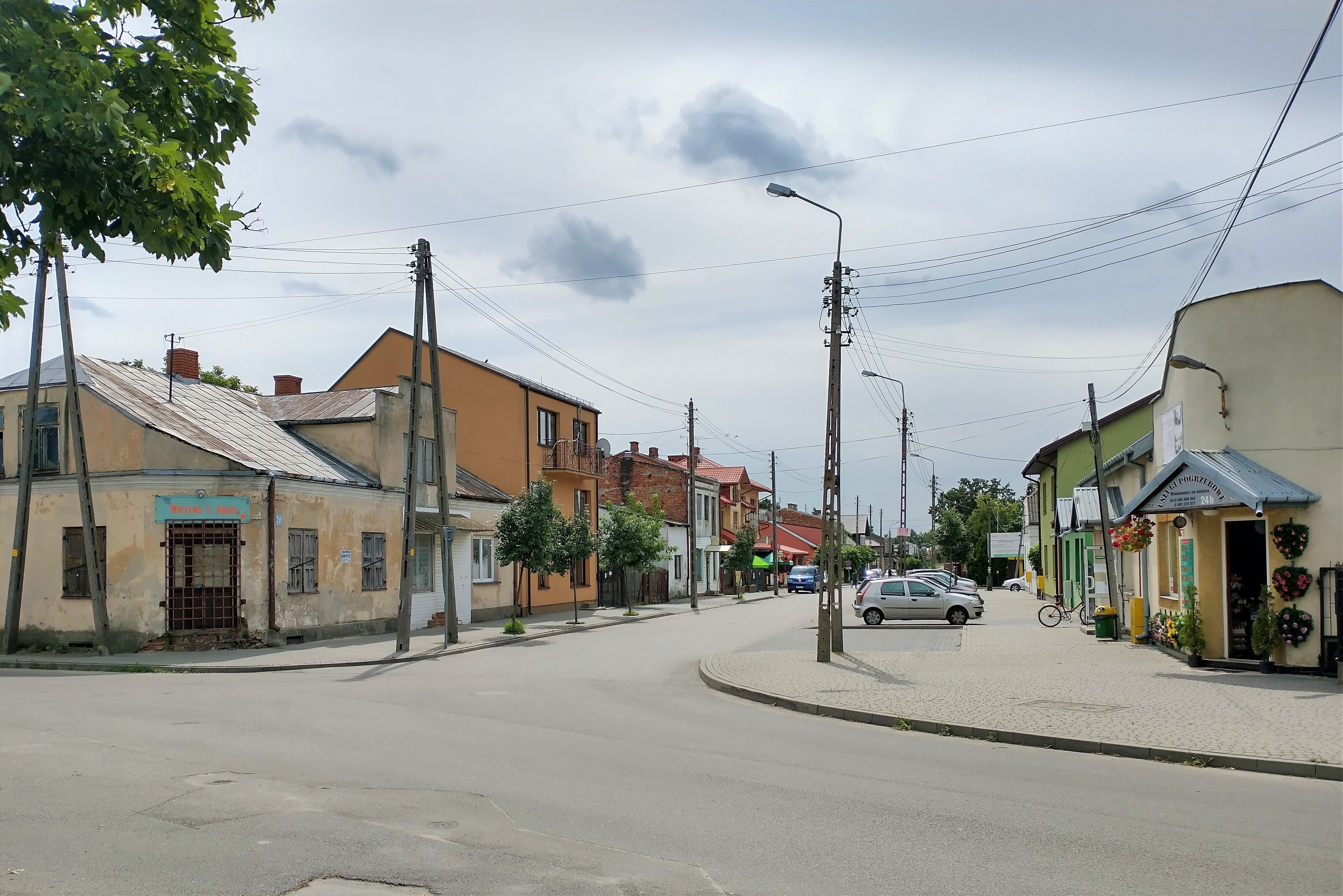 Stanisławów - powiat miński. Rynek.